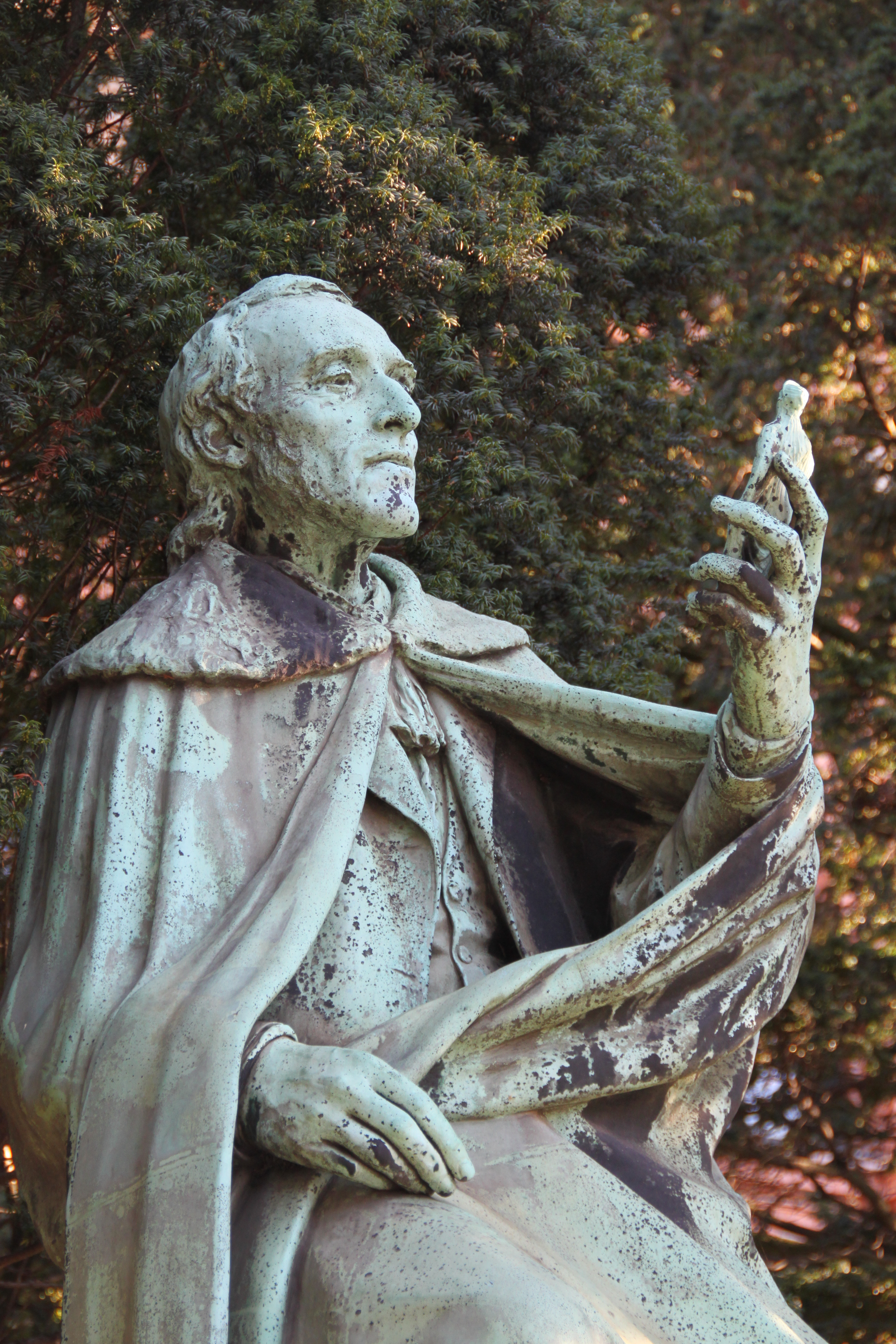 Georg Zoëga statue in the garden of the Ny Carlsberg Glyptotek in Copenhagen, Denmark (Tietgengade side). Info